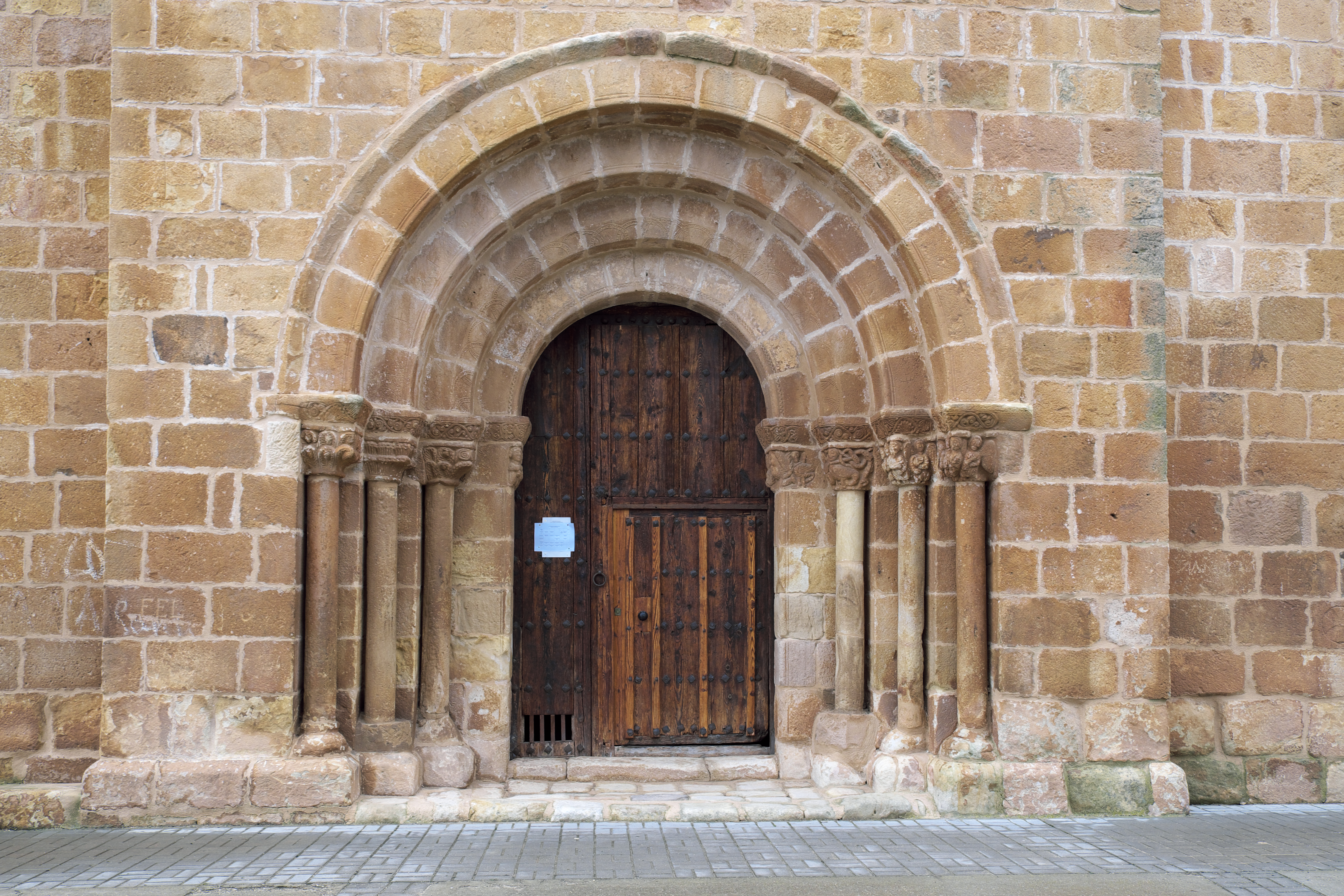 Kirche Nuestra Señora de los Ángeles in Fuensaúco, einem Ortsteil von Renieblas in der Provinz Soria (Kastilien-León/Spanien), Portal an der Südseite